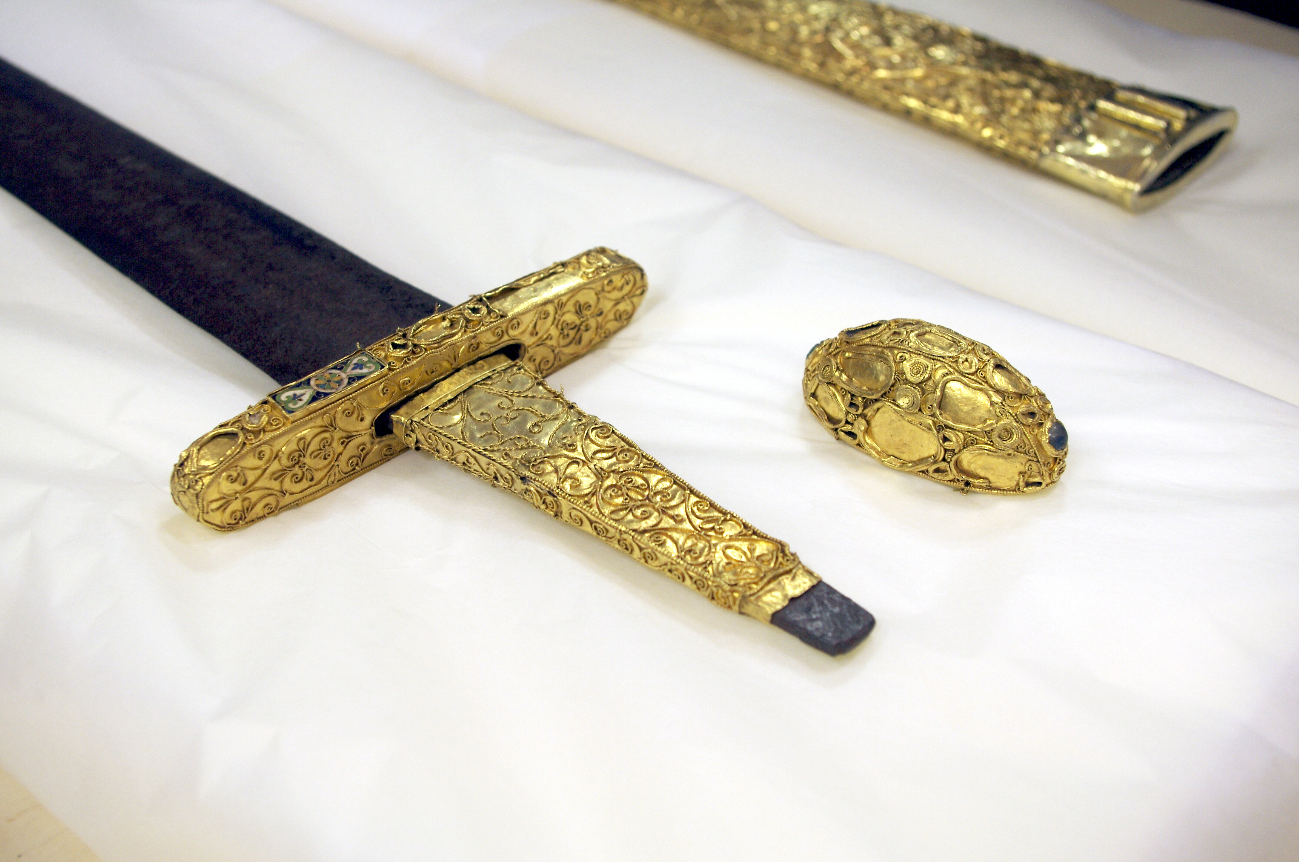 Griff und abgenommener Knauf des Essener Schwerts